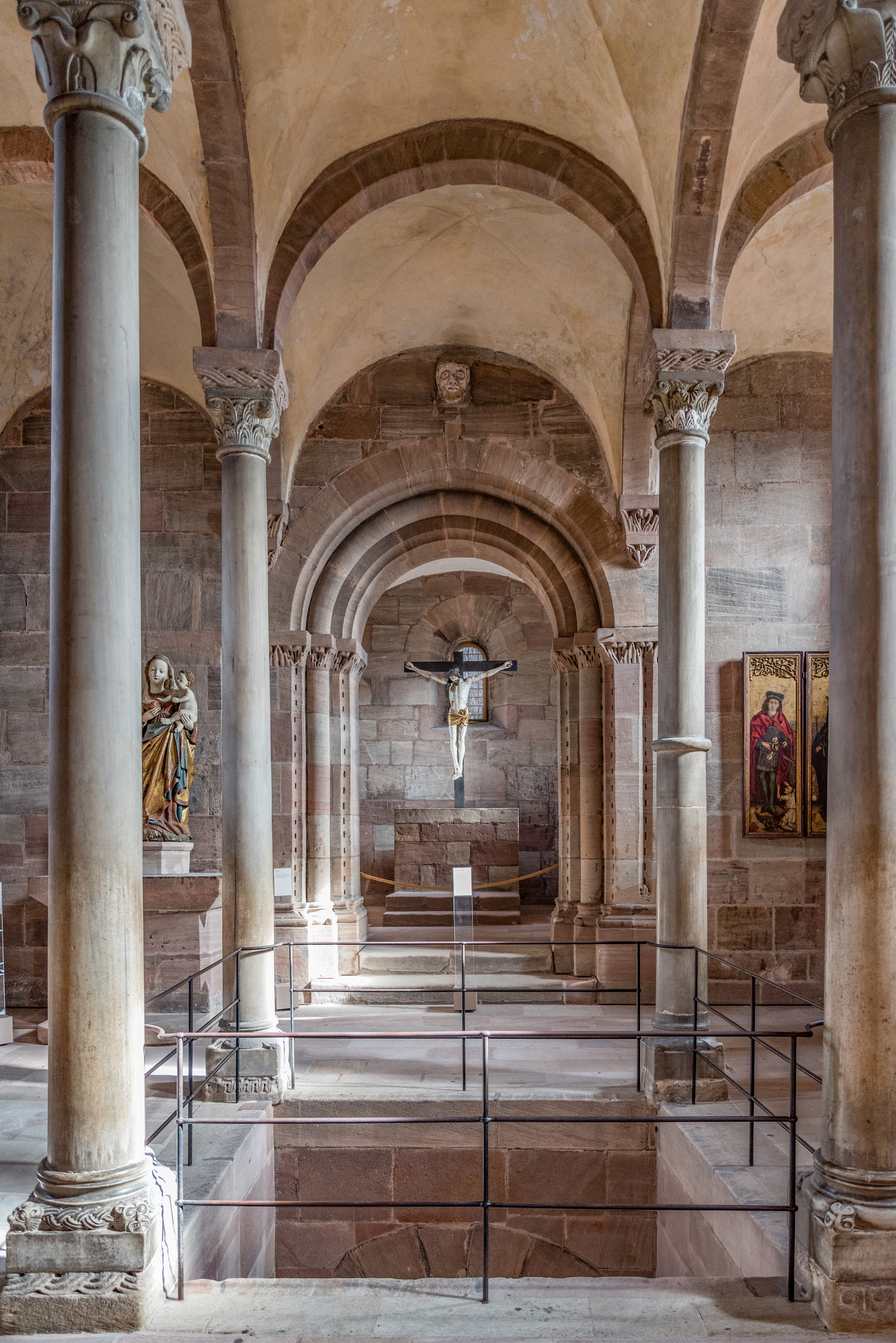 Nürnberg, Burg, Burgkapelle, Detail Innen